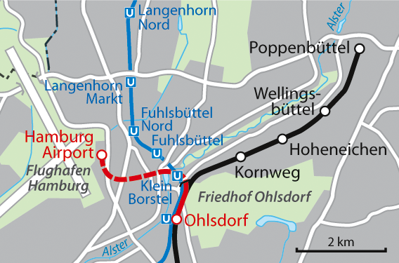 Karte der Flughafen-S-Bahn Hamburg